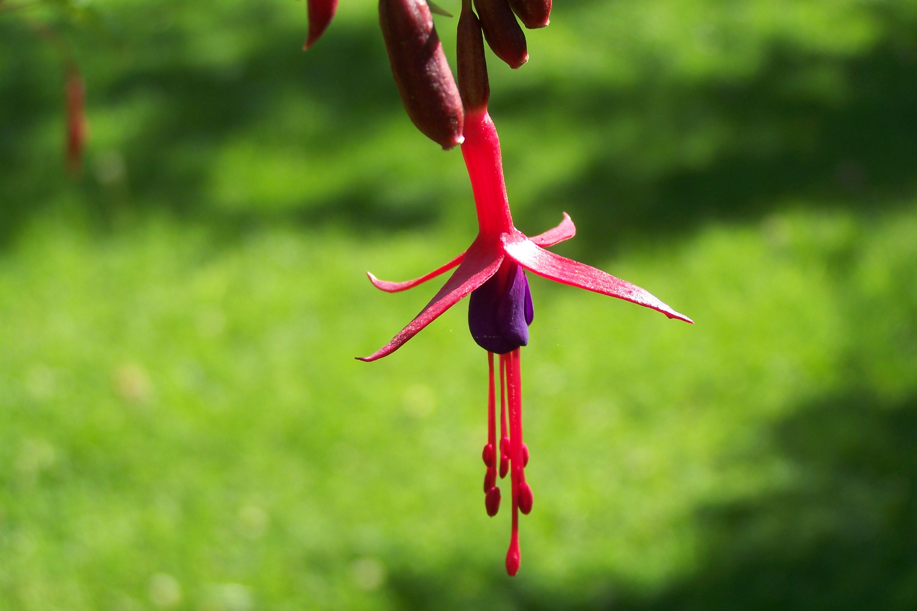 Chilco flor nativa de Chile